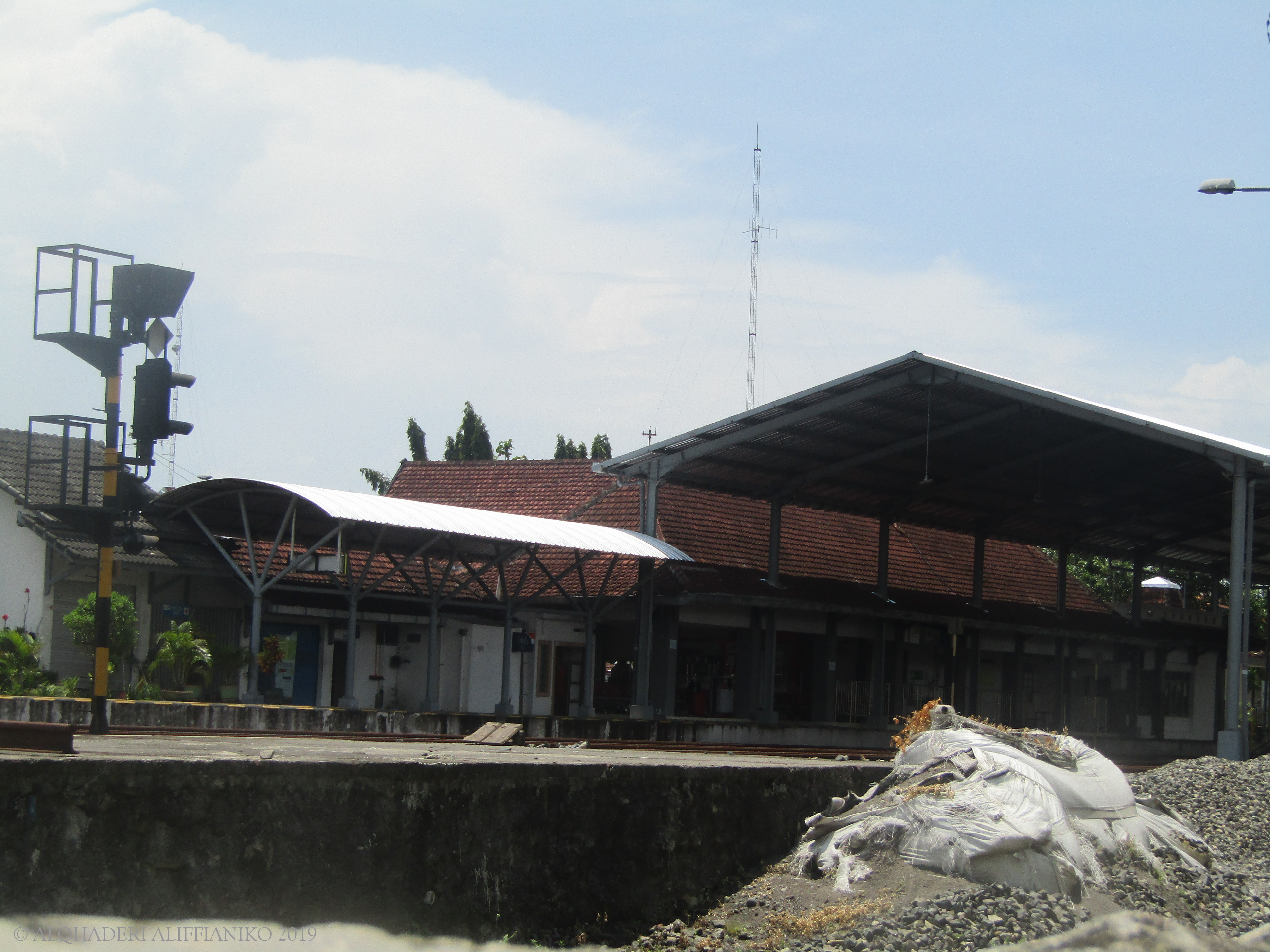 Emplasemen Stasiun Wates saat agak sepi, 2019